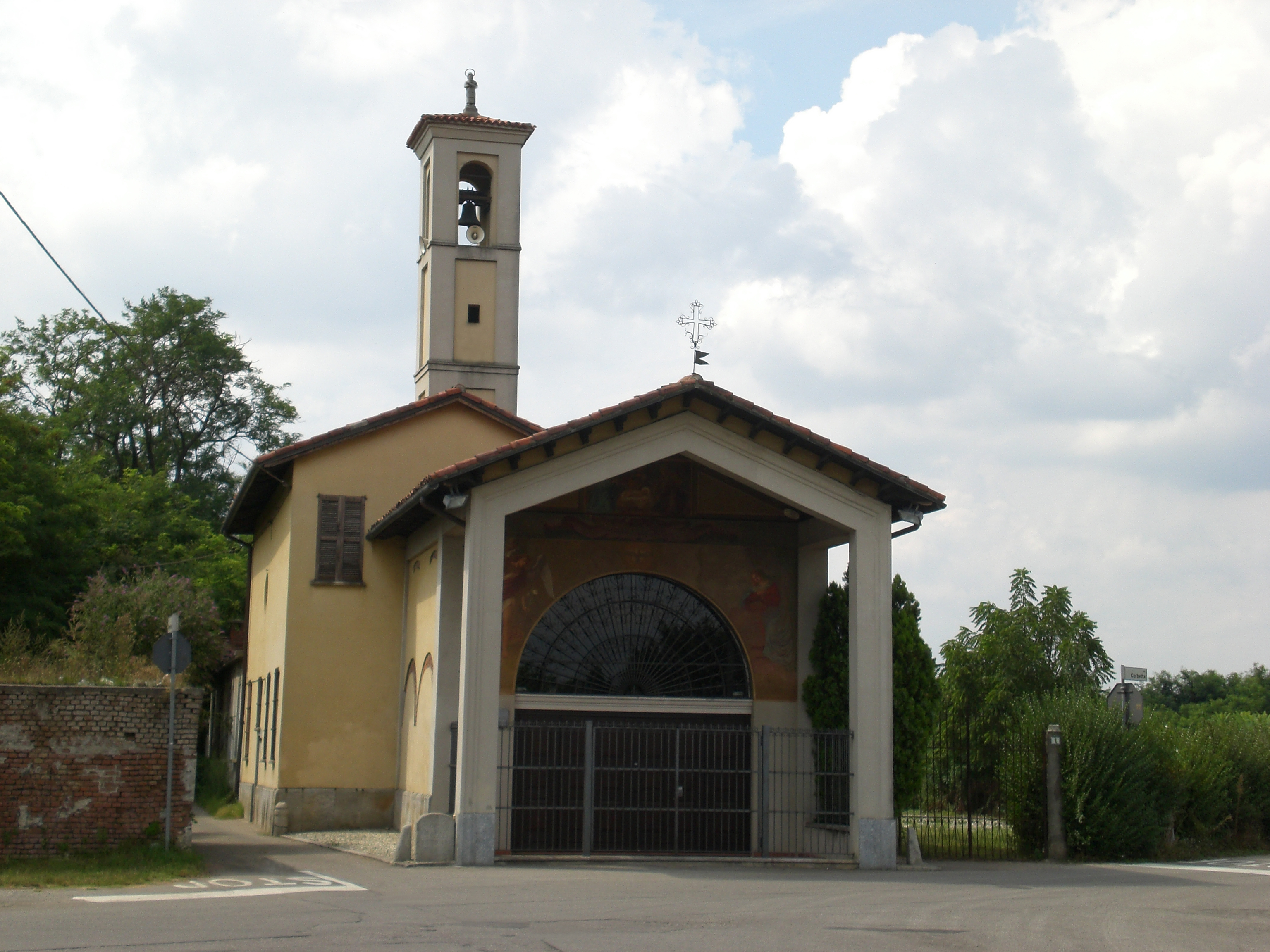 Chiesetta di Madonna in Veroncora (parrocchia SS. Redentore) a Busto Arsizio (VA).